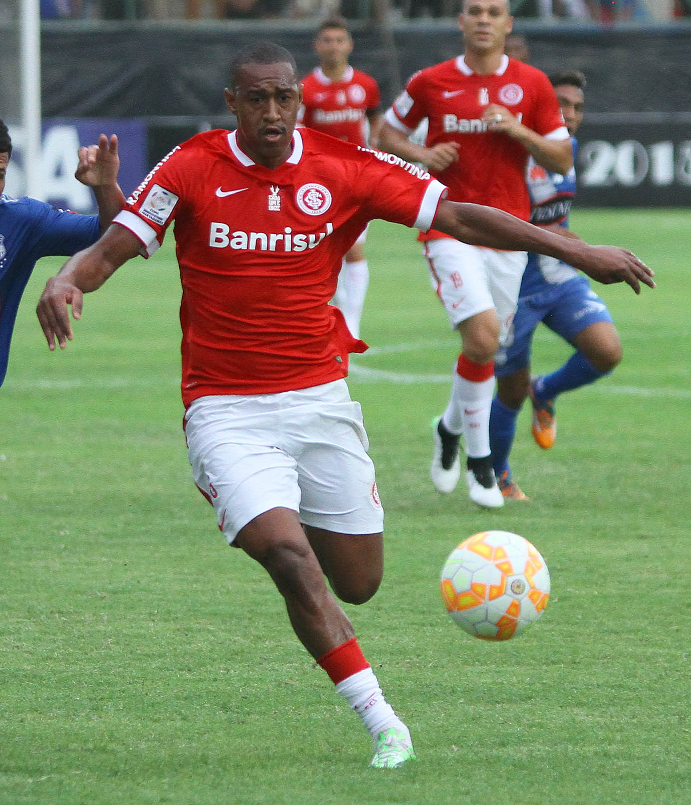 Guayaquil, Miércoles 18 de marzo del 2015 (ANDES).-Emelec se enfrenta a Internacional de Brasil por la Copa Libertadores Foto:César Muñoz/ANDES